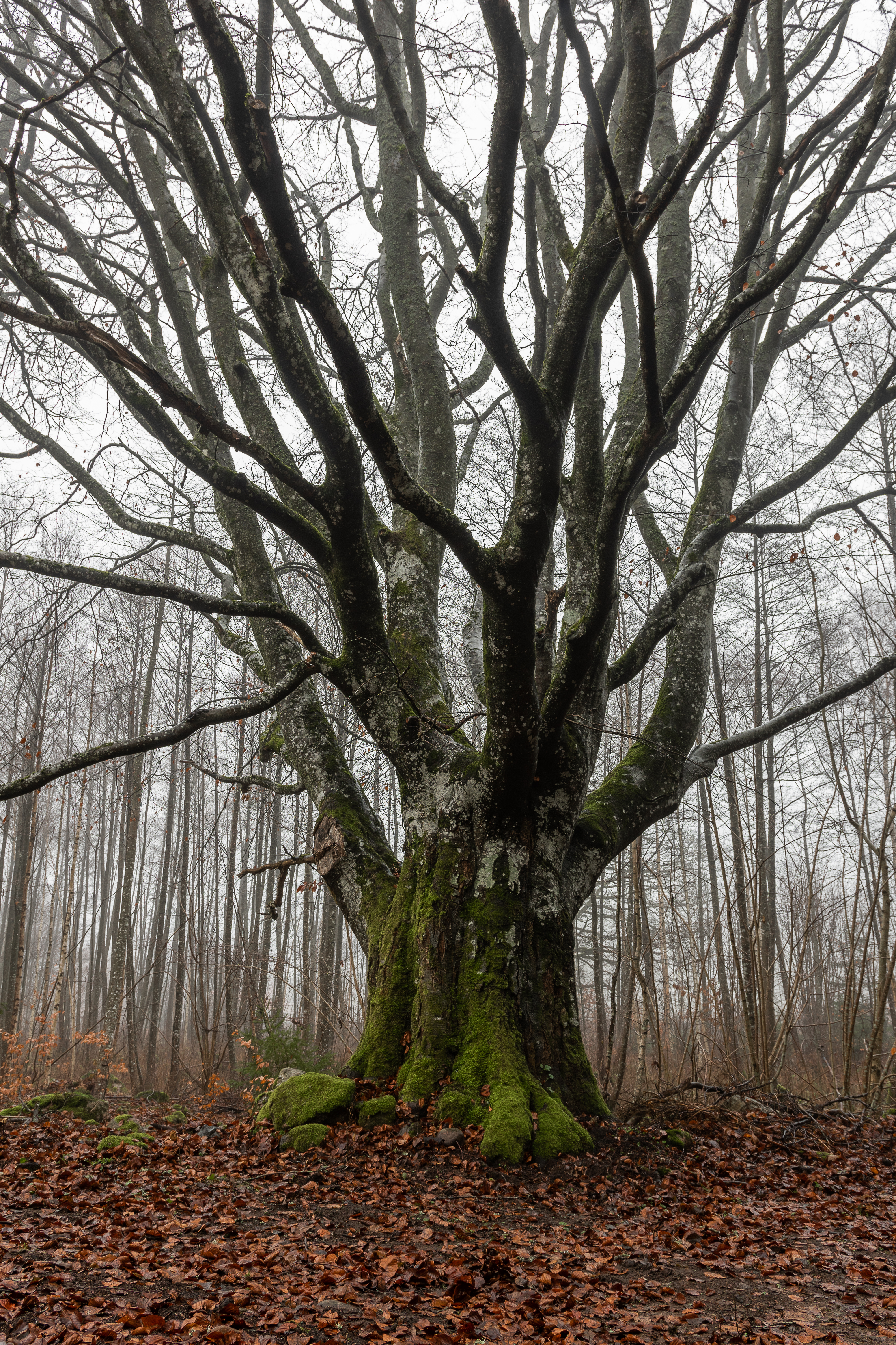 Gammal solitär bok belägen i Hästveda, norra Skåne. Den låga förgreningen beror förmodligen på att trädet blivit hamlat i sin ungdom. Av diametern att döma (ca 5,5 m) är trädet en bra bit över 100 år gammalt.